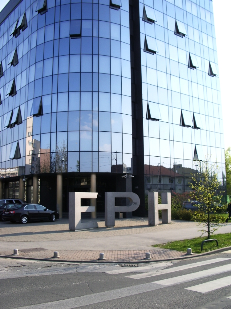 Zgrada EPH u Zagrebu.